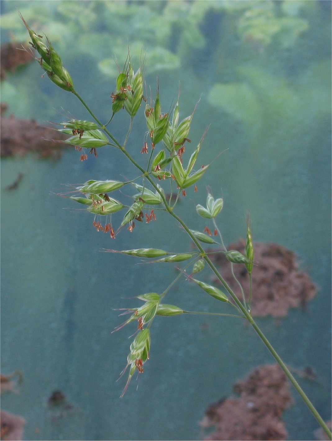 (Zachte dravik in bloei) flowering Bromus mollis